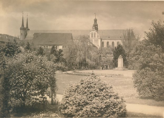 Kriegerdenkmal Oliva (Danzig).